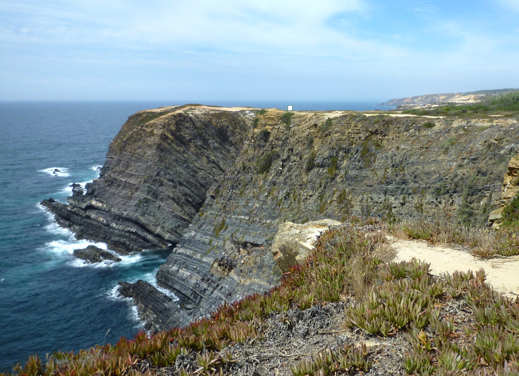 Afloramiento del carbonífero del Grupo Flysch Baixo Alentejo (Zona Sudportuguesa del Macizo Ibérico) en el cabo Sardão (Cavaleiro, fegresía de São Teotónio, Odemira, Alentejo, Portugal)